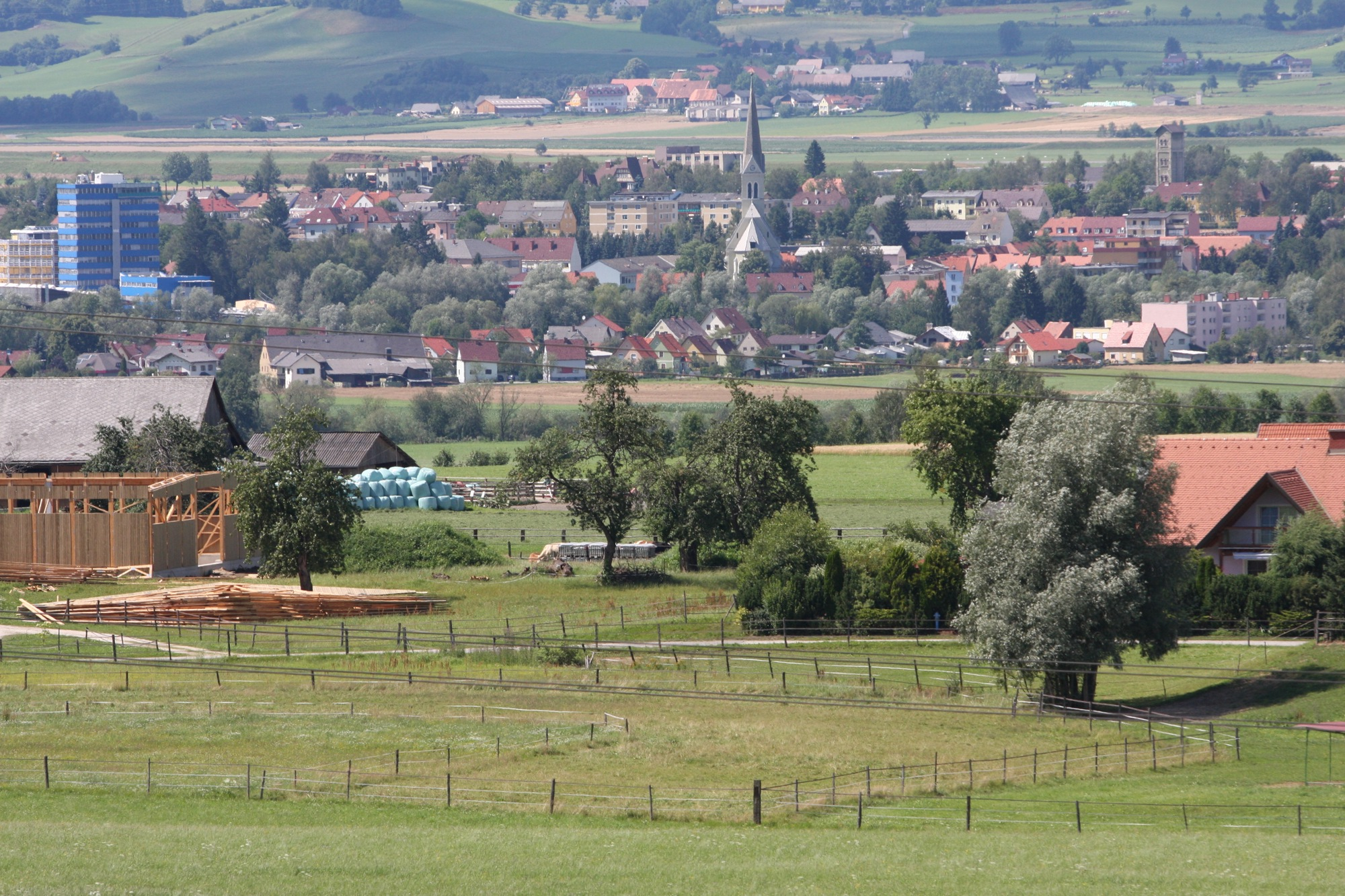 Blick auf Zeltweg Richtung Norden